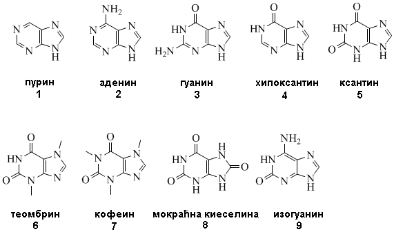 врсте пурина